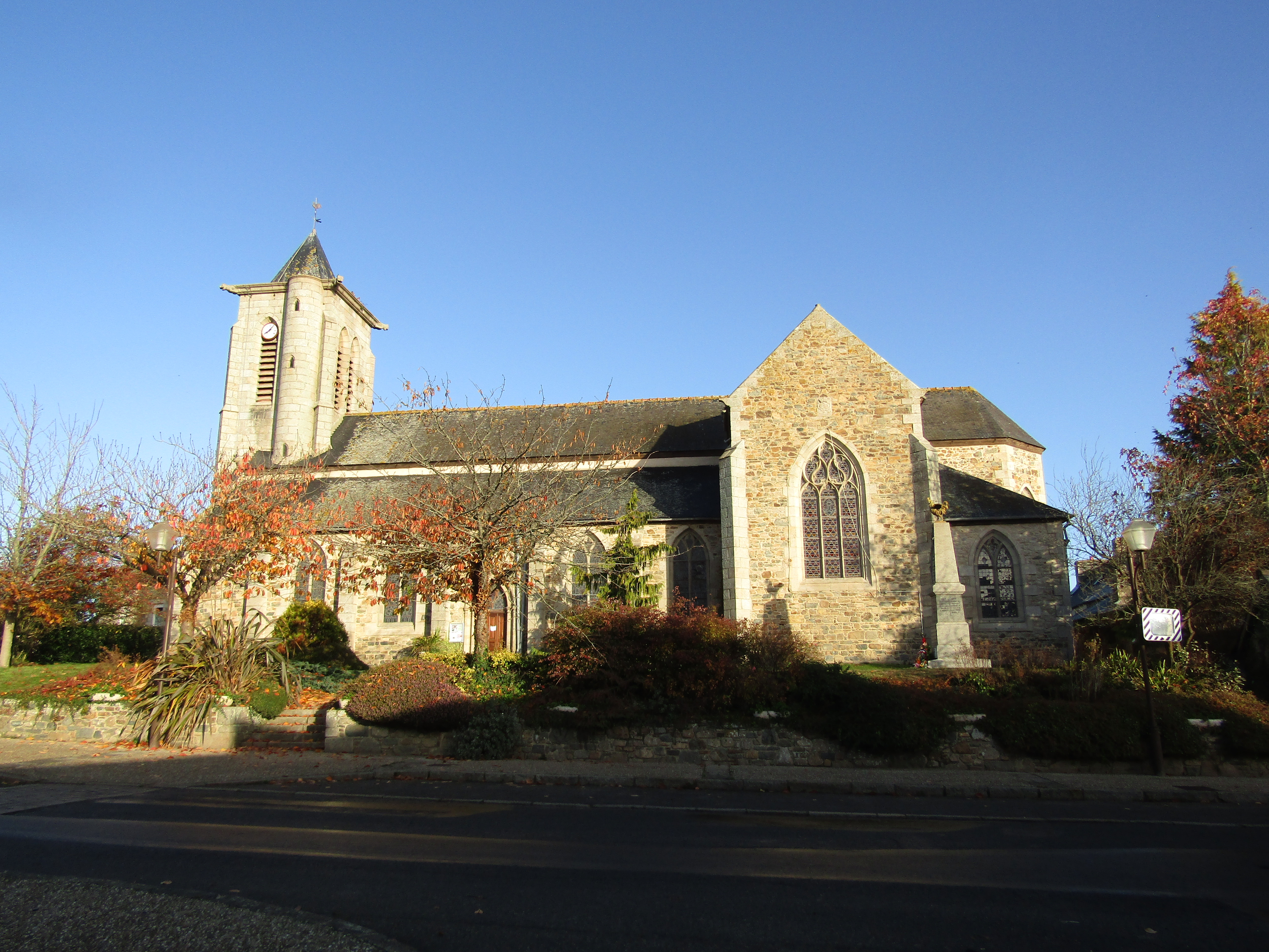 l'église de Kerbors